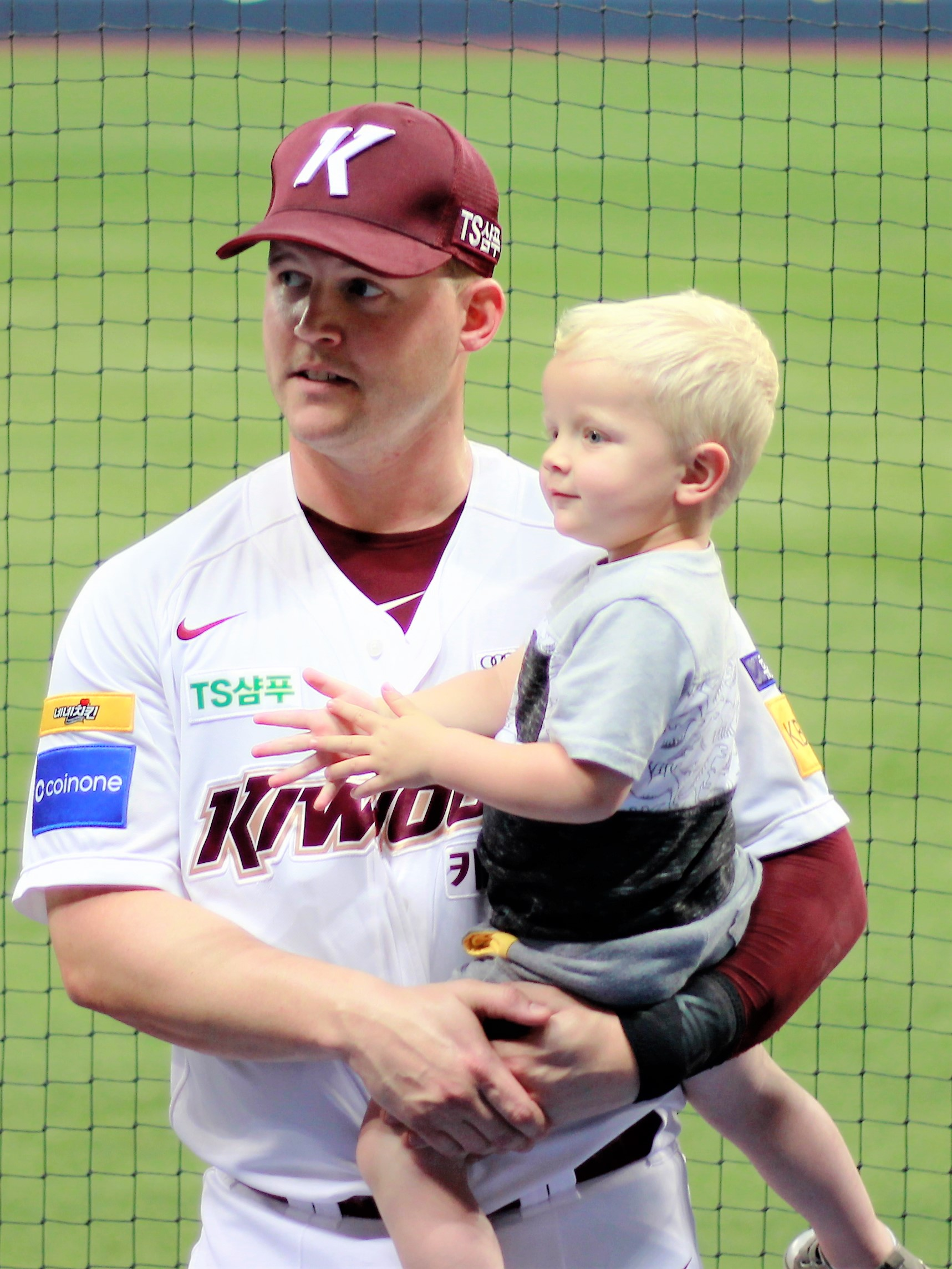 키움 히어로즈의 제리 샌즈 선수가 아들과 함께 수훈선수 인터뷰를 위해 올라와 있다.